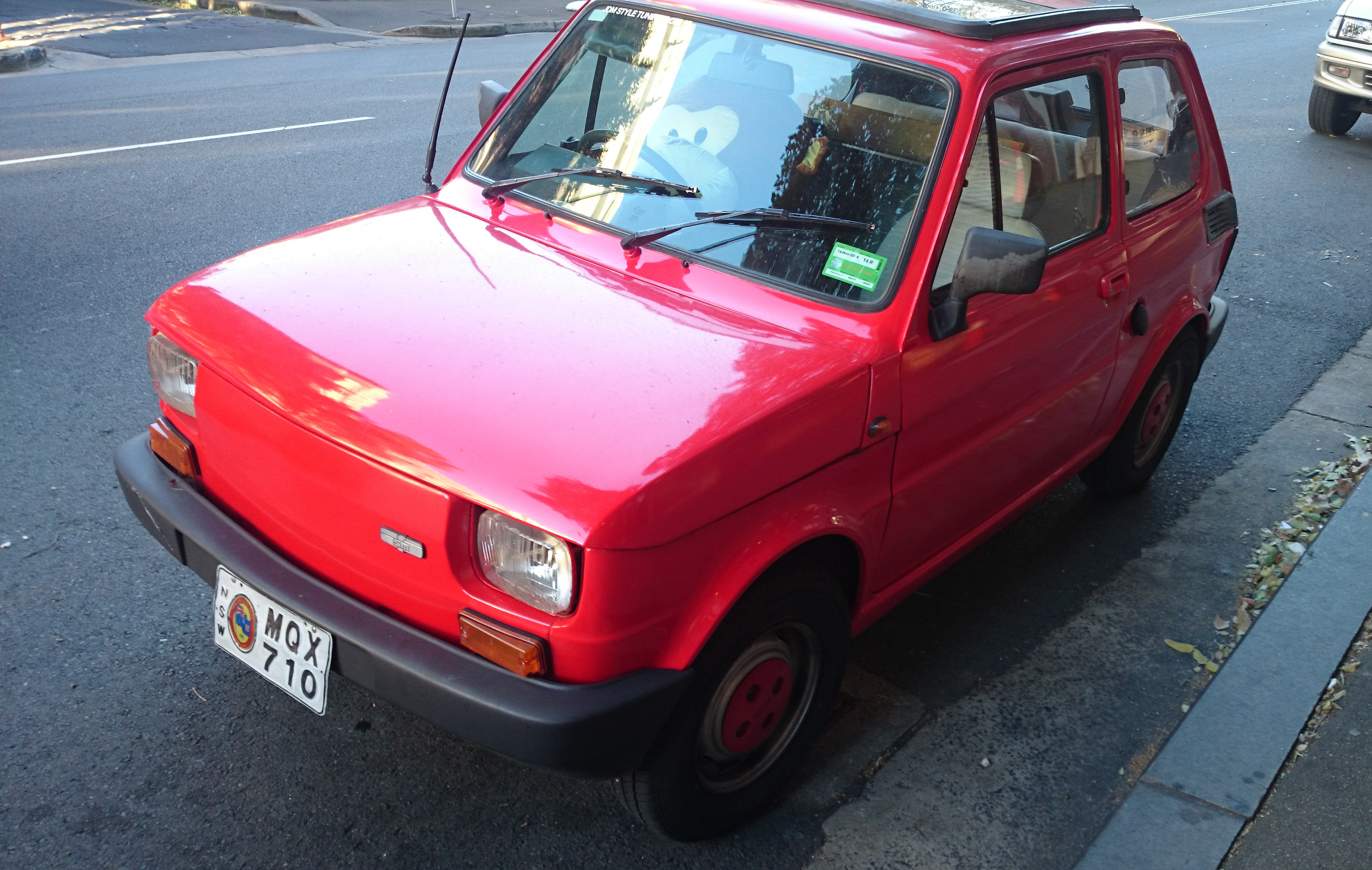 FSM Niki 650